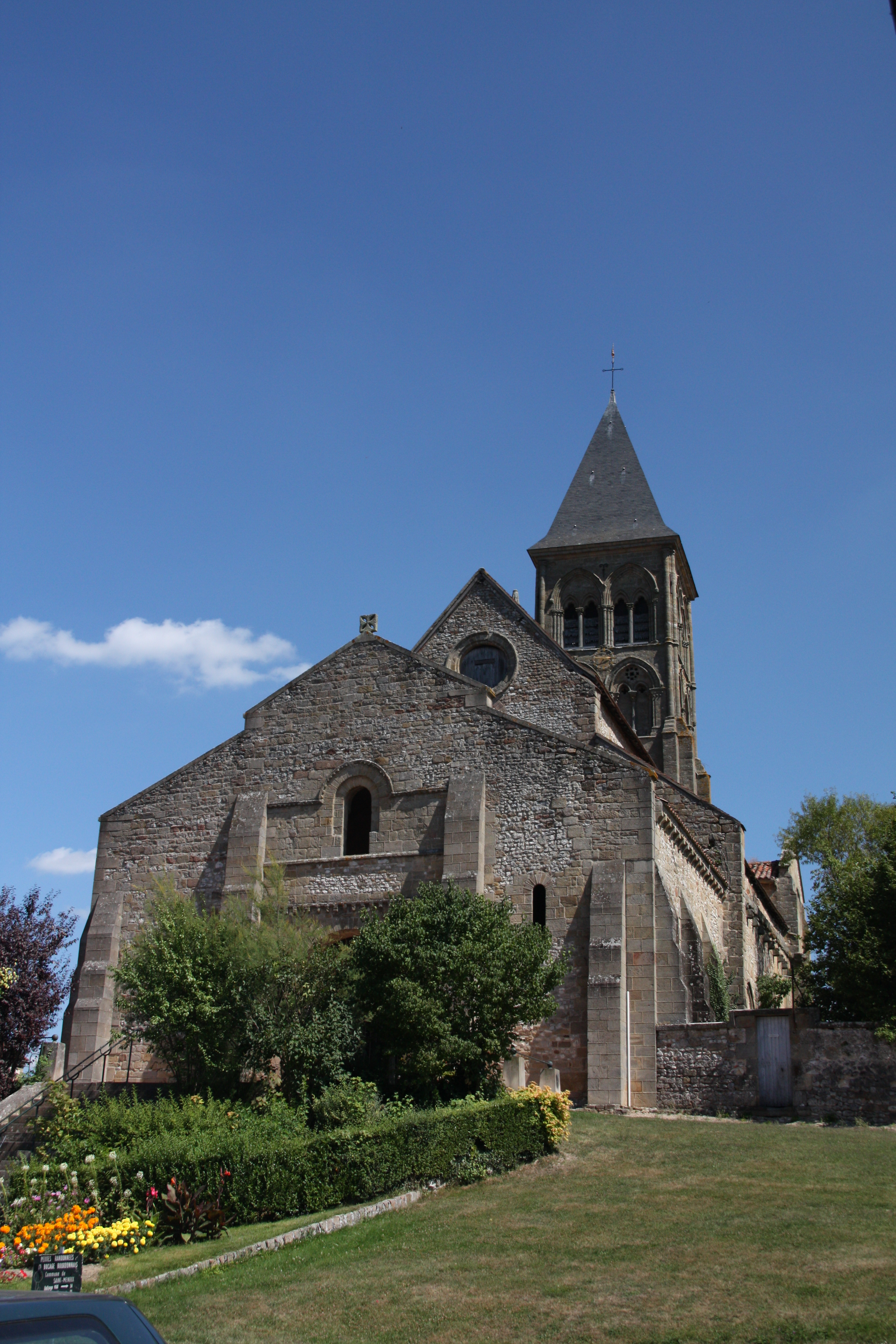 Église romane à Saint-Menoux, Allier, France